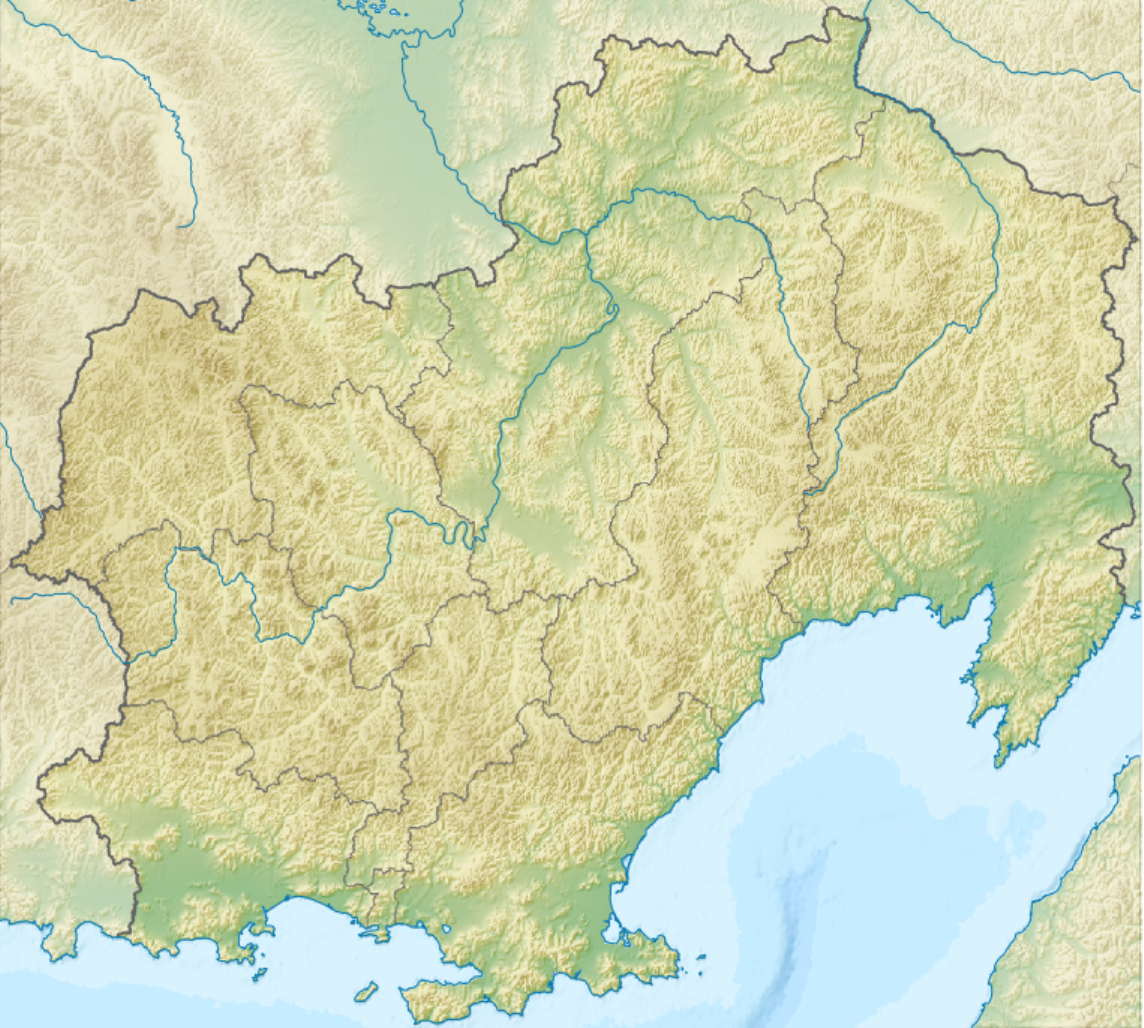 Физическая карта Магаданской области. Проекция: Коническая равнопромежуточная проекция, параметры проекции подобраны под File:Magadan obl outline.png Параметры проекции для GMT: -Jd152.904/62.65/46.29104472/62.638300402/2.269 -R145.35/58.61/164.2/66.13r Инструменты: GMT, , Inkscape